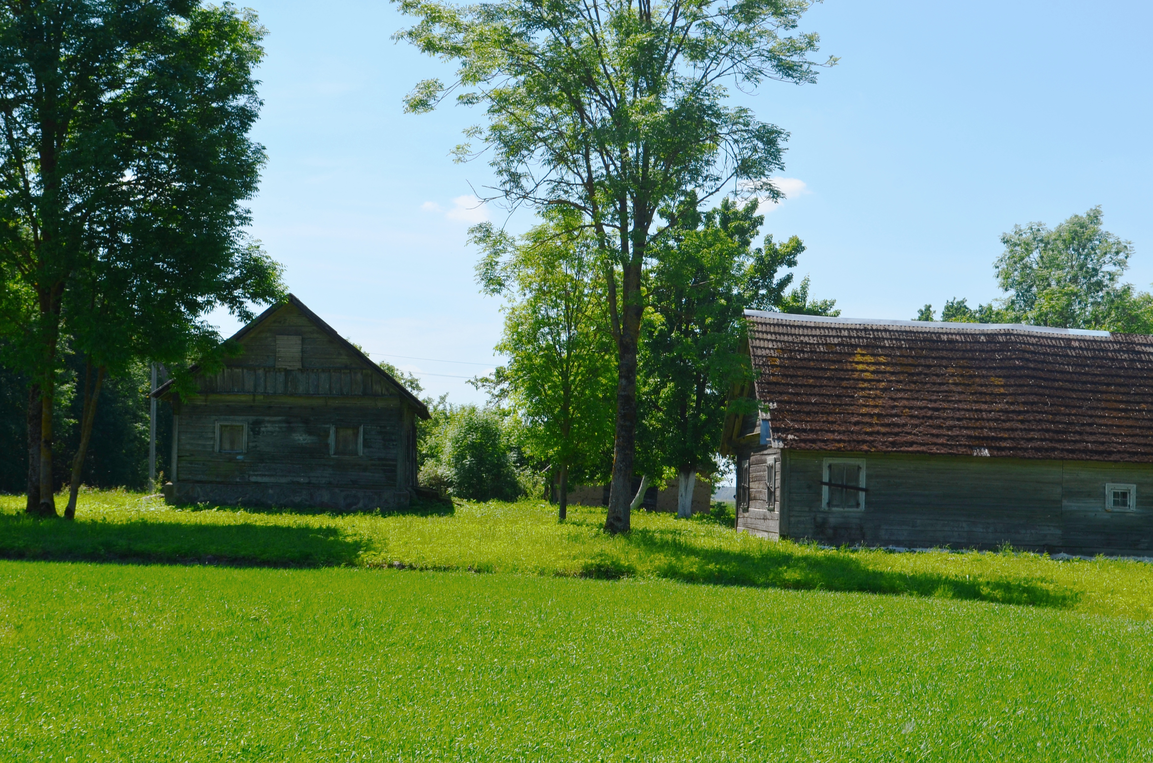 Senovinė sodyba Gaubiuose, Pakruojo raj.